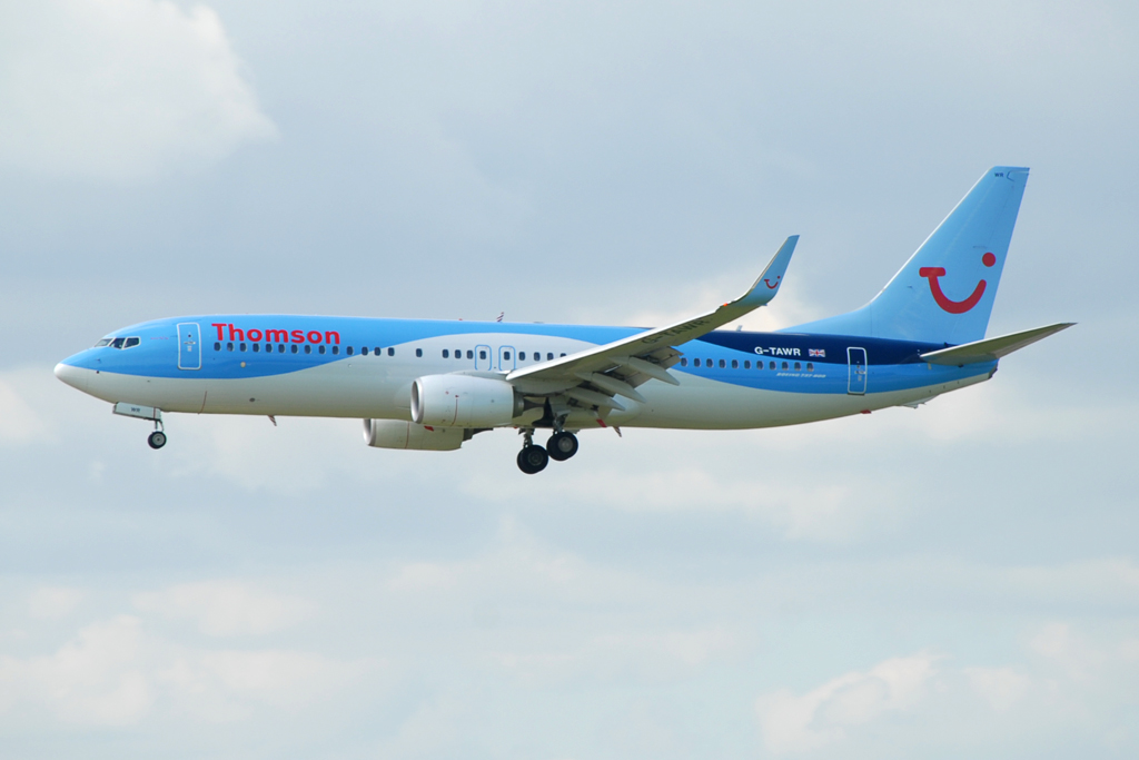 G-TAWR@LGW 05JUN14